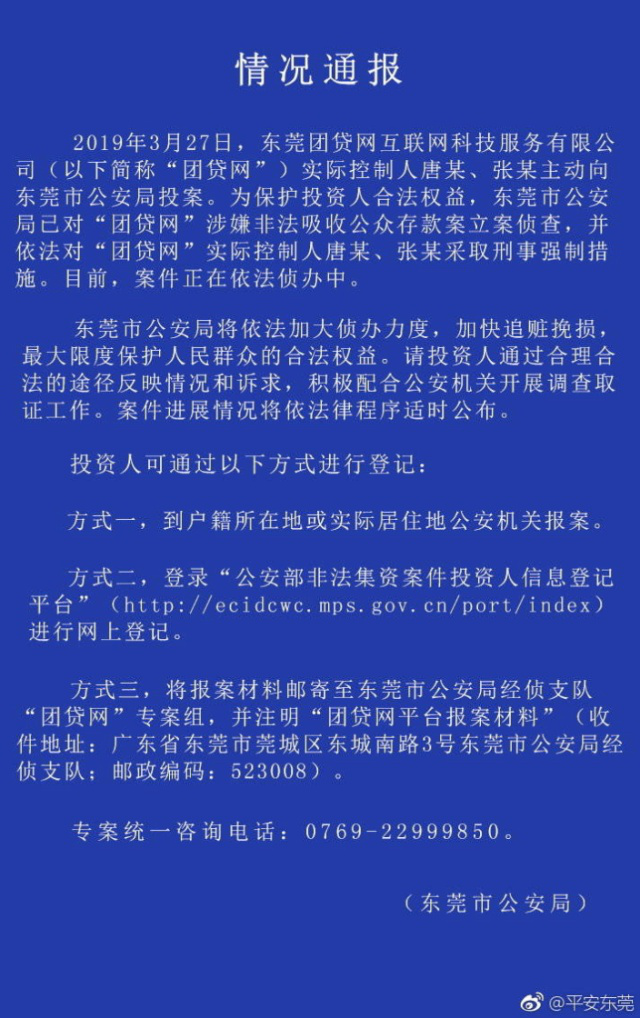 中文（中国大陆）: 东莞公安对“团贷网”涉嫌非法吸收公众存款案立案侦查